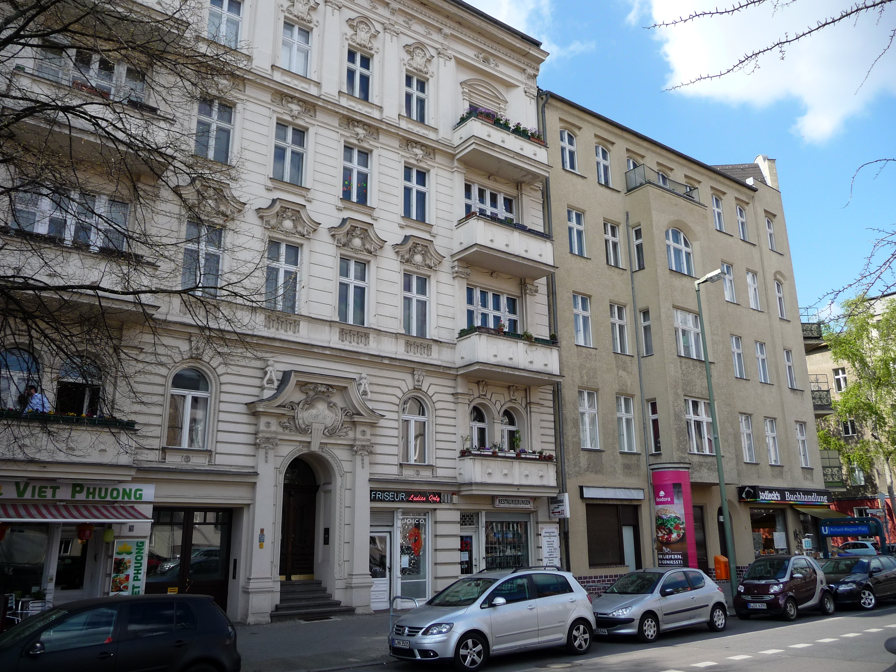 Richard-Wagner-Straße 37, 10585 Berlin, Außenkulisse für den Fernsehfilm „Ku’damm 56“